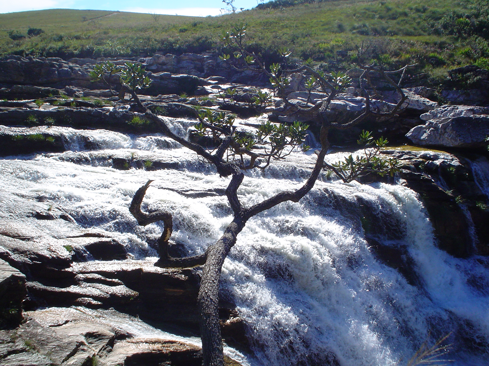 Parque Nacional da Serra da CanastraSerra da Canastra - MG